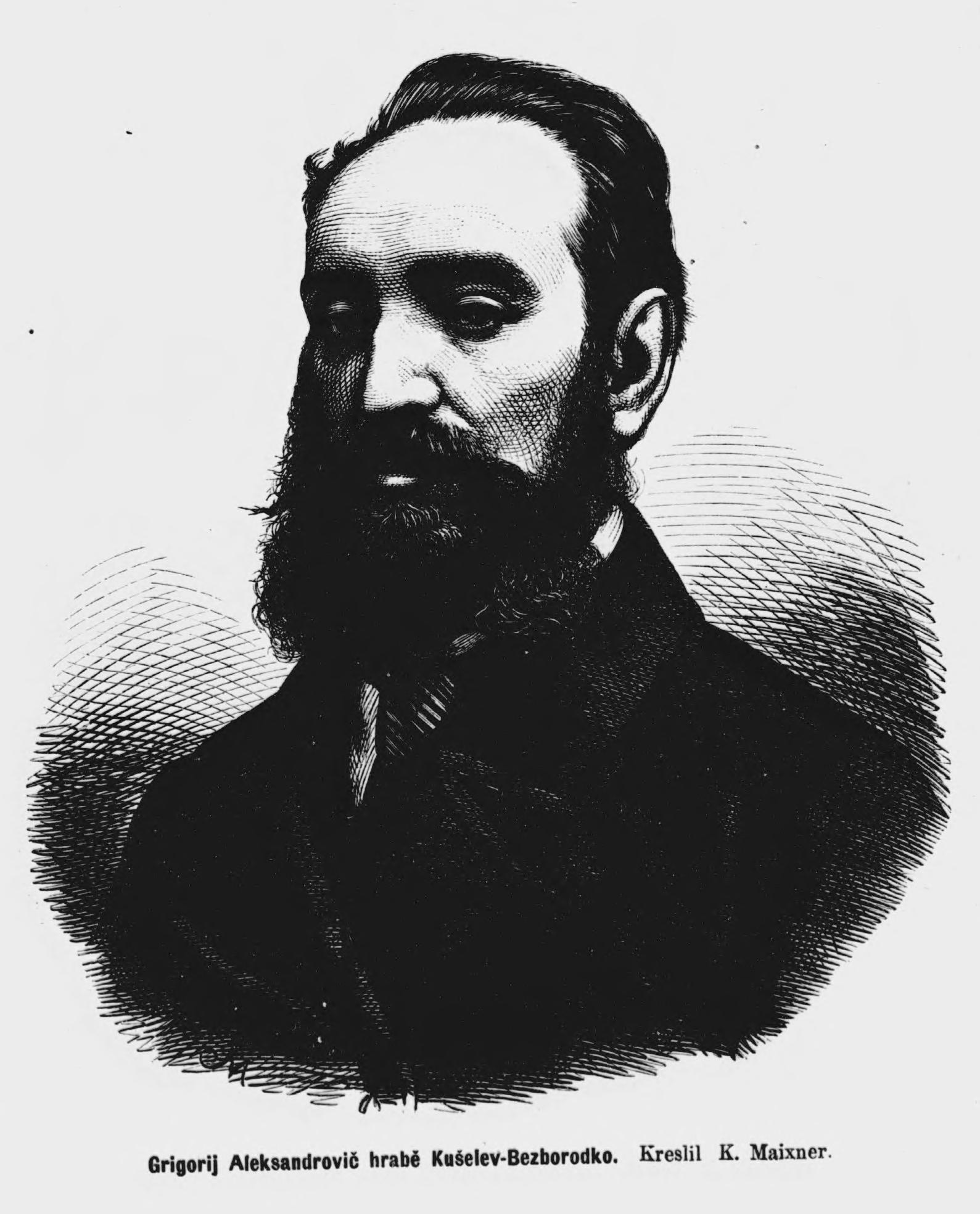 Portrait of Grigory Alexandrovich Kushelev-Bezbrodko (Russian: Григорий Александрович Кушелёв-Безбородко, 1832 - 1870), Russian writer.